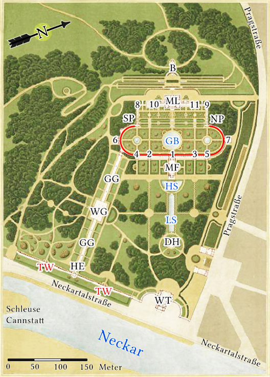 Ludwig von Zanth: Plan der Wilhelma von 1855 (Die Buchstabenkürzel und die Zahlen zur Bezeichnung von Gebäuden und Geländeteilen wurden nachträglich eingefügt). Rote Linie = innerer Wandelgang, B = Belvedere, DH = Damaszenerhalle, GB = Großes Bassin, GG = Gewächshausgang, HE = Haupteingang, HS = Halbmondsee, LS = Langer See, MF = Maurischer Festsaal (heute Aquarium-Terrarium), ML = Maurisches Landhaus, NP = Nördlicher Pavillon, SP = Südlicher Pavillon, TW = äußerer Wandelgang mit der Terrakottawand, WG = Wintergarten, WT = Wilhelma-Theater 1 = Hauptpavillon des inneren Wandelgangs, 2 u. 3 = Nebenpavillons, axial zu den Eckpavillons der Gewächshausflügel, 4 u. 5 = Nebenpavillons, axial zu den Pavillons SP bzw. NP, 6 u. 7 = Bogenpavillons, 8 u. 9 = Eckkioske der Laubengänge, 10 u. 11 = Eckpavillons der Gewächshausflügel.